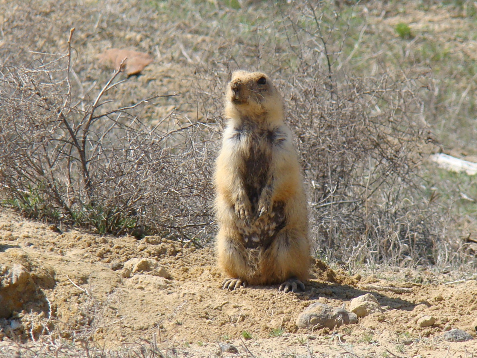 Суслик жёлтый (Spermophilus fulvus). Город Байконур, Кызылординская область, Казахстан